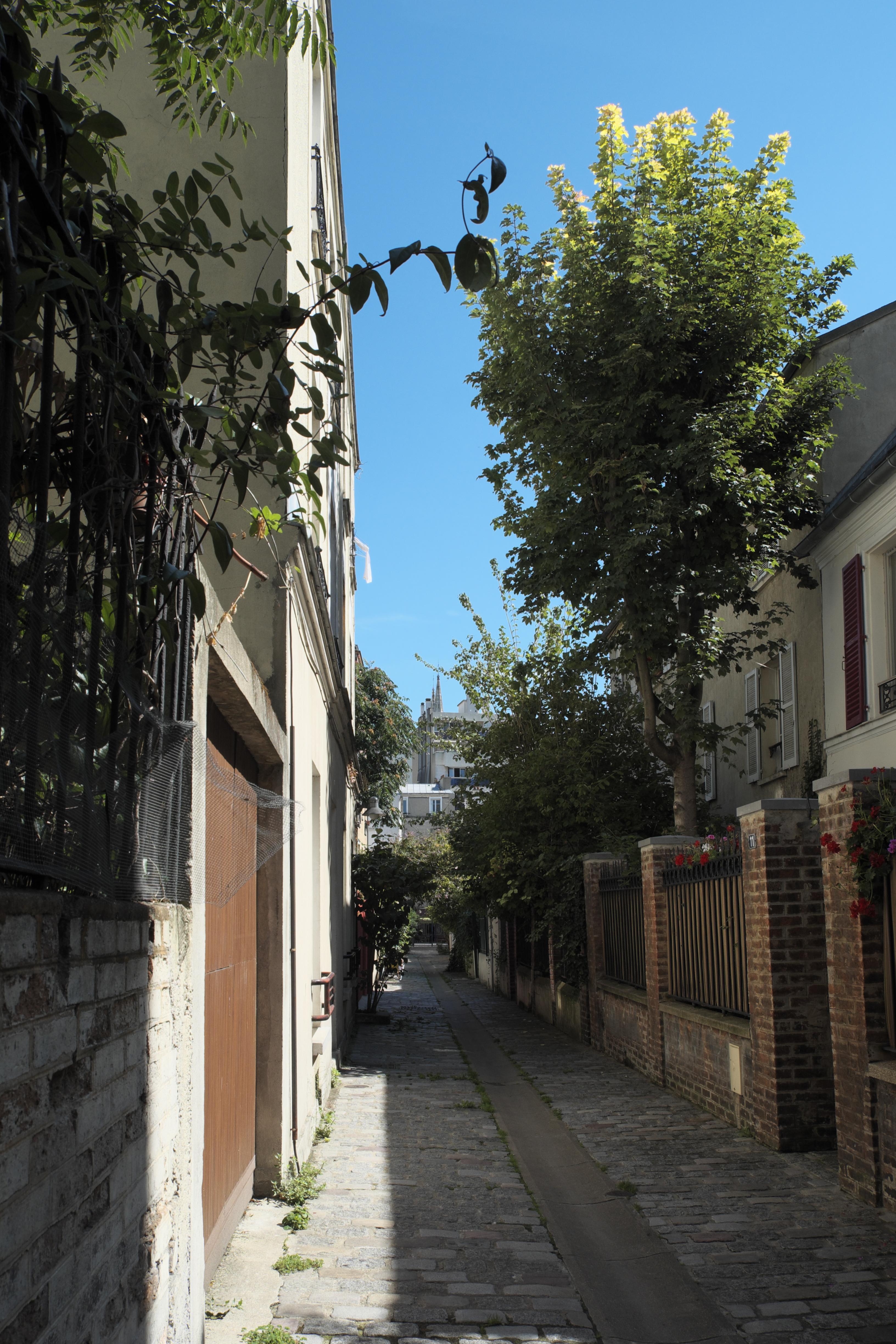 Privatweg in Belleville im 19. Arrondissement in Paris (Île-de-France/Frankreich)